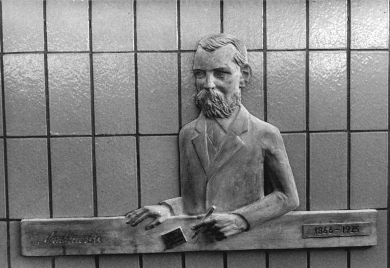 ADN-ZB-Link-30. 4. 87-Berlin: Im U-Bahnhof Marchlewskistraße (Linie Alexanderplatz-Tierpark) wurde am östlichen Eingang ein Porträt-Relief des Arbeiterführers Julian Marchlewski (1866-1925) angebracht. Die 75 Zentimeter hohe Steinguß-Arbeit ist ein Werk des Bildhauers Reinhard Jacob.